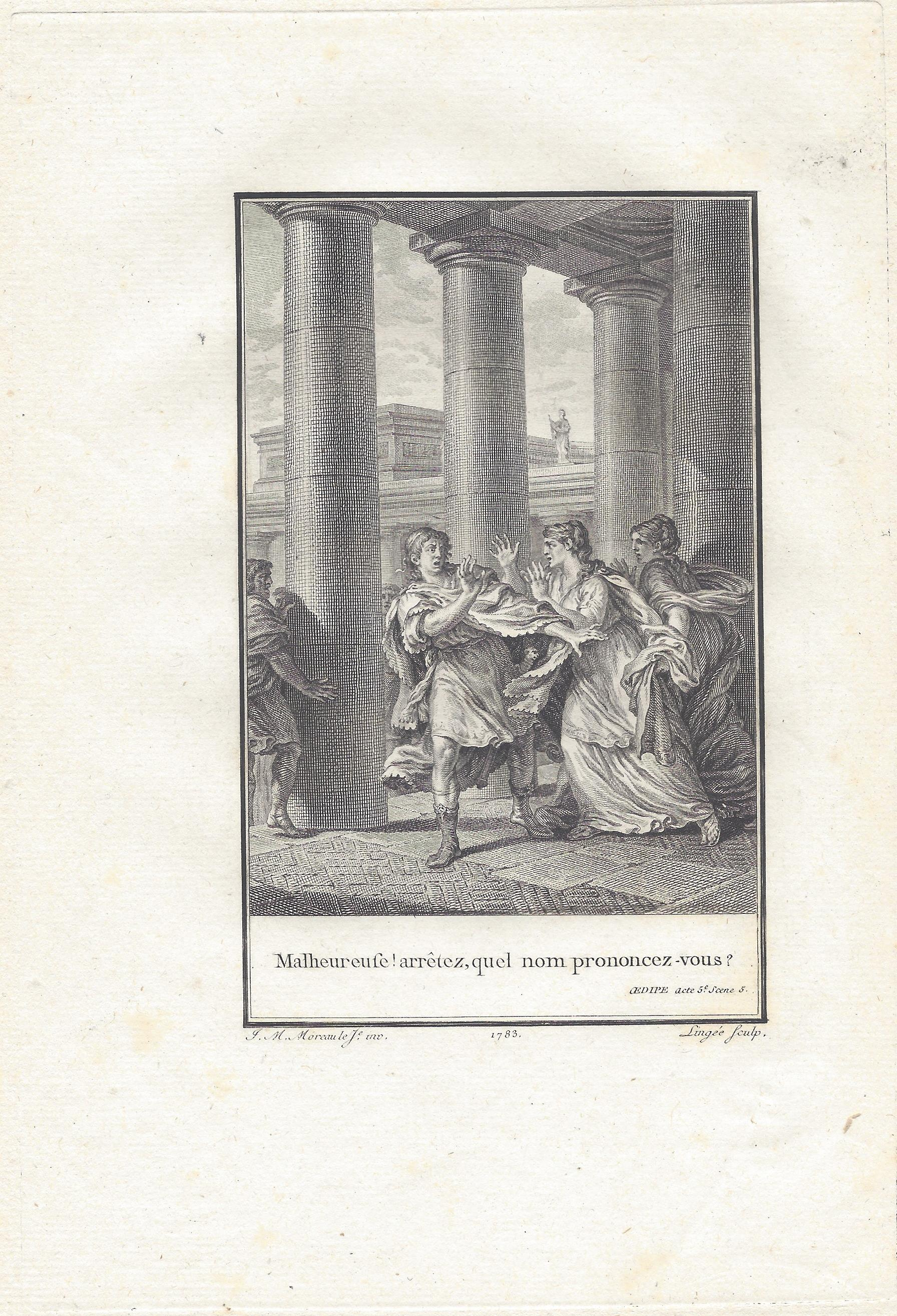 Voltaire:Oedipe Akt 3 Szene 3 Kupferstich von Thérèse Eléonore Lingée nach Jean-Michel Moreau